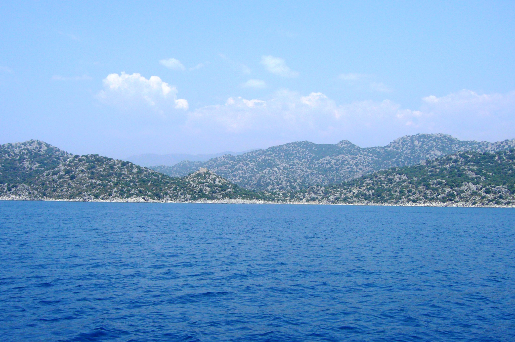 Турция - Turkey